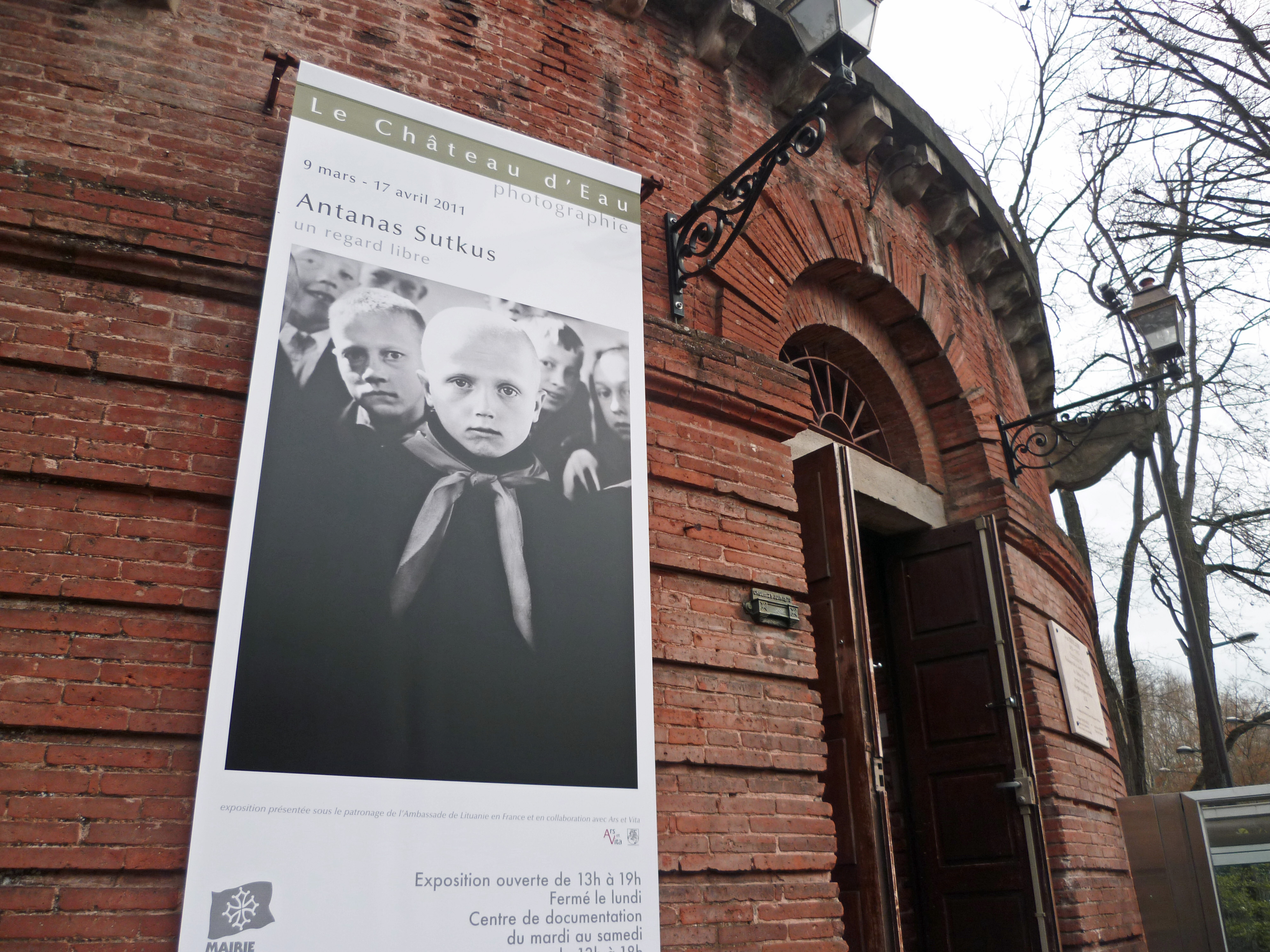 Toulouse (Haute-Garonne, France) : Expostion de photographies d'Antanas Sutkus au Château d'Eau.